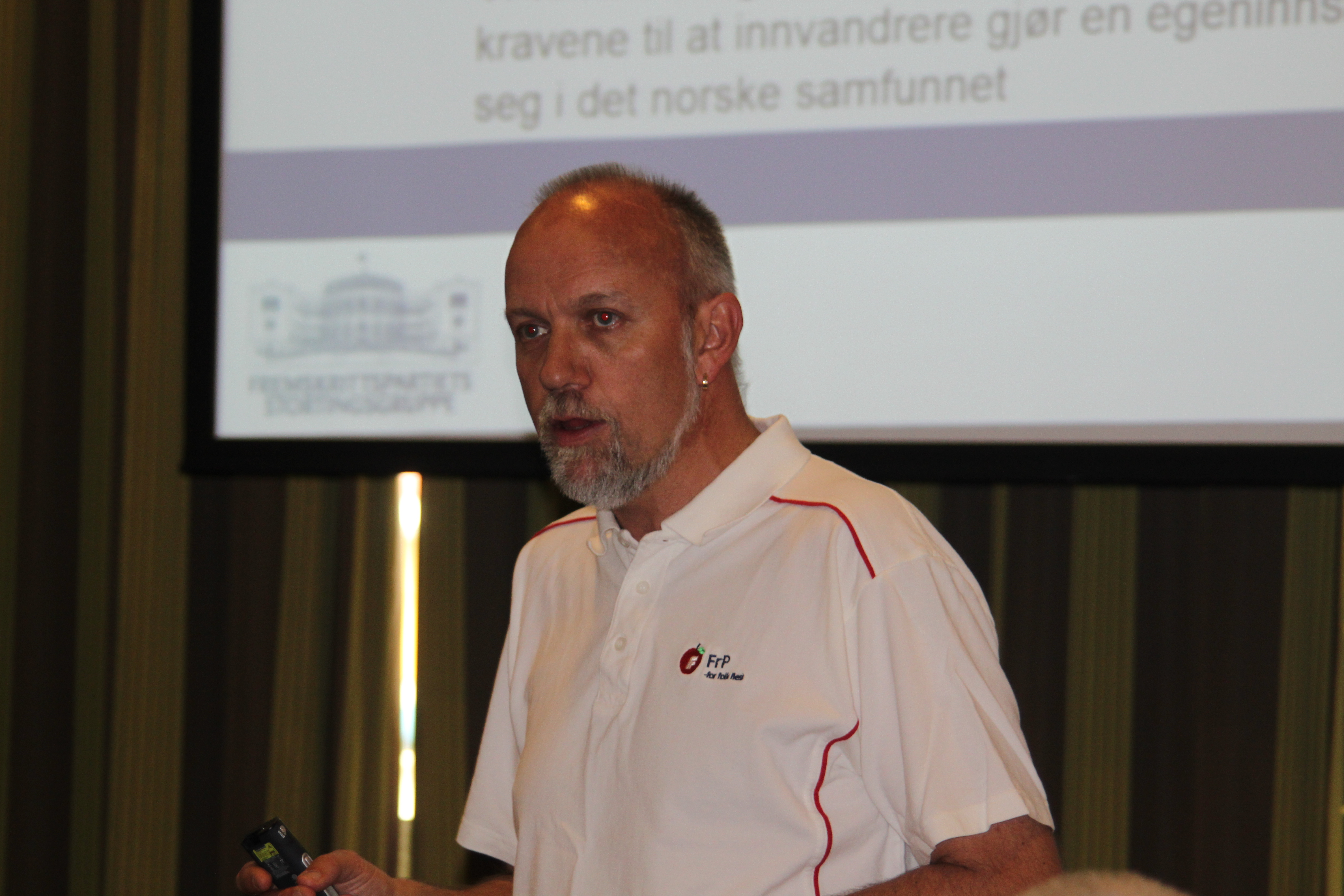 Morten Ørsal Johansen holder foredrag på FrPs ValgCamp, juni 2013